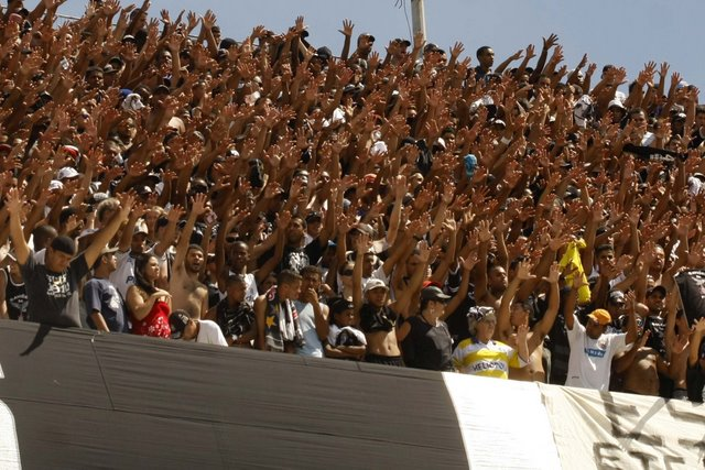 Gaviões da Fiel